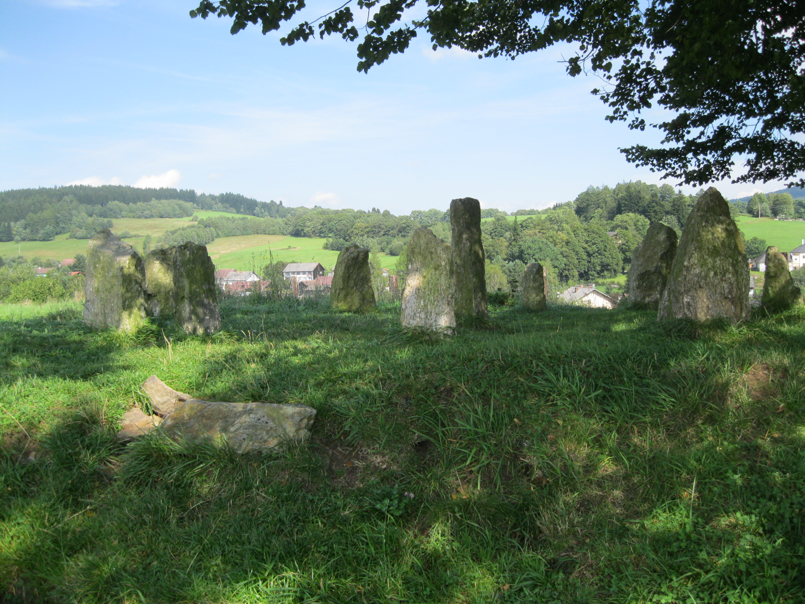 Uskupení jedenácti prehistorických menhirů na vyvýšeném návrší u Volar. Česká ulice - Samota. Volary v okrese Prachatice. Česká republika.